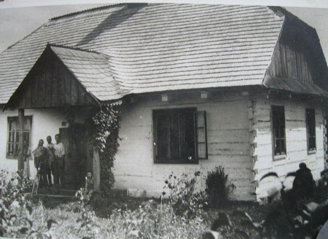 Czerniczyn - plebania w latach 30. XX wieku